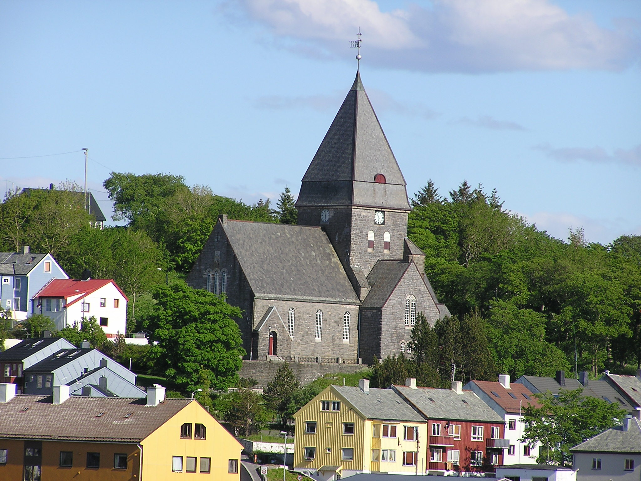 Nordlandet kyrkje i Kristiansund Nordlandet church in Kristiansund, Norway